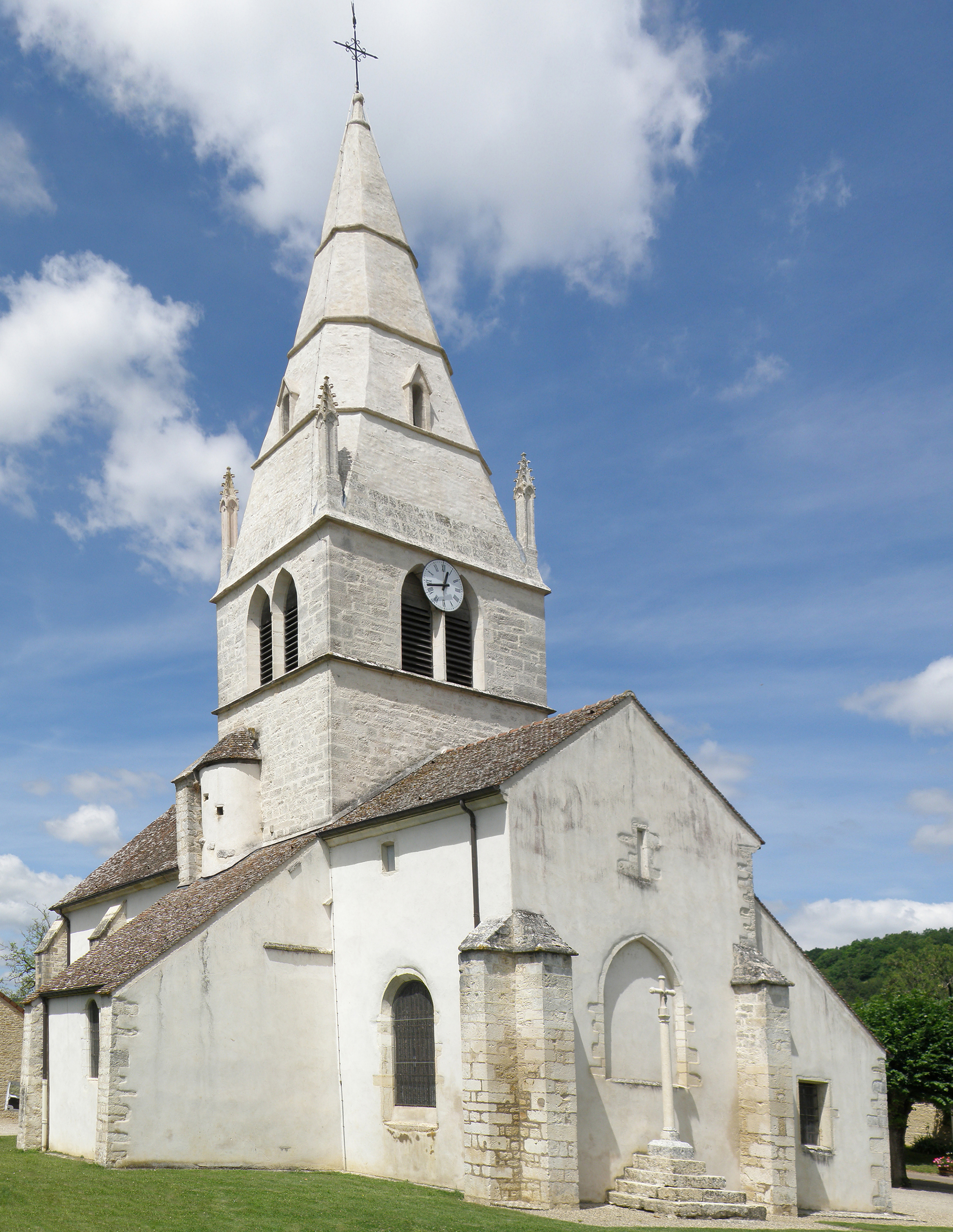 Auxey-Duresses (Côte-d'Or, France). Église Saint-Martin.